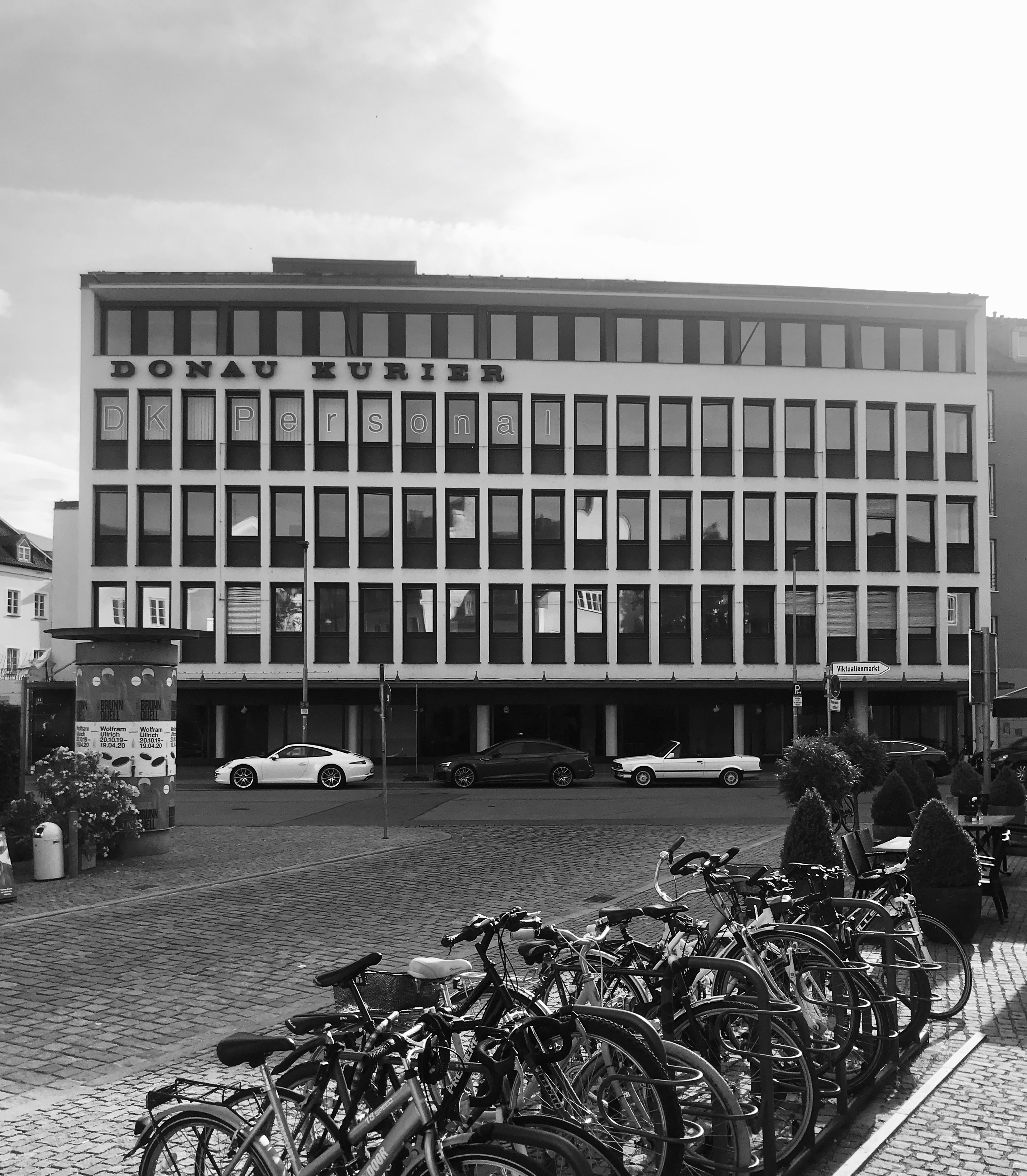 Ingolstadt